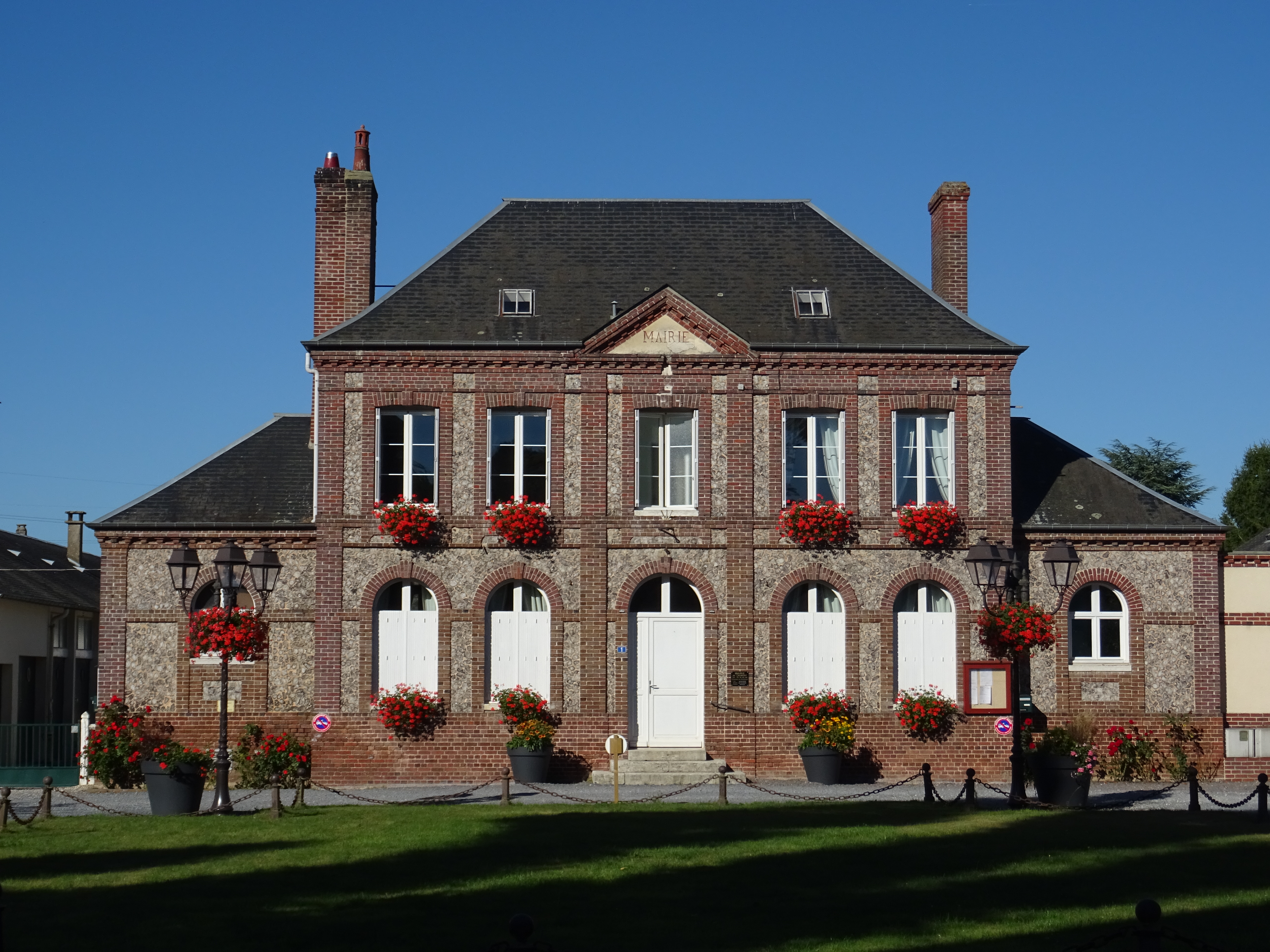 Mairie de Caumont (Eure)